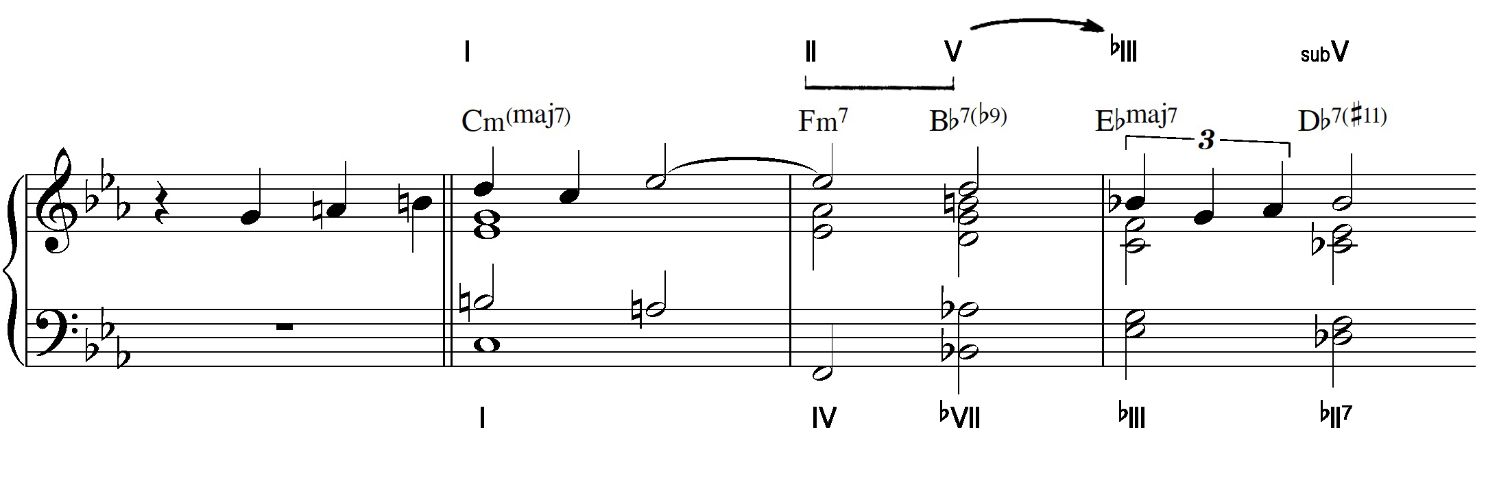 Análisis Musical con Cifrado Anglosajón y Romano